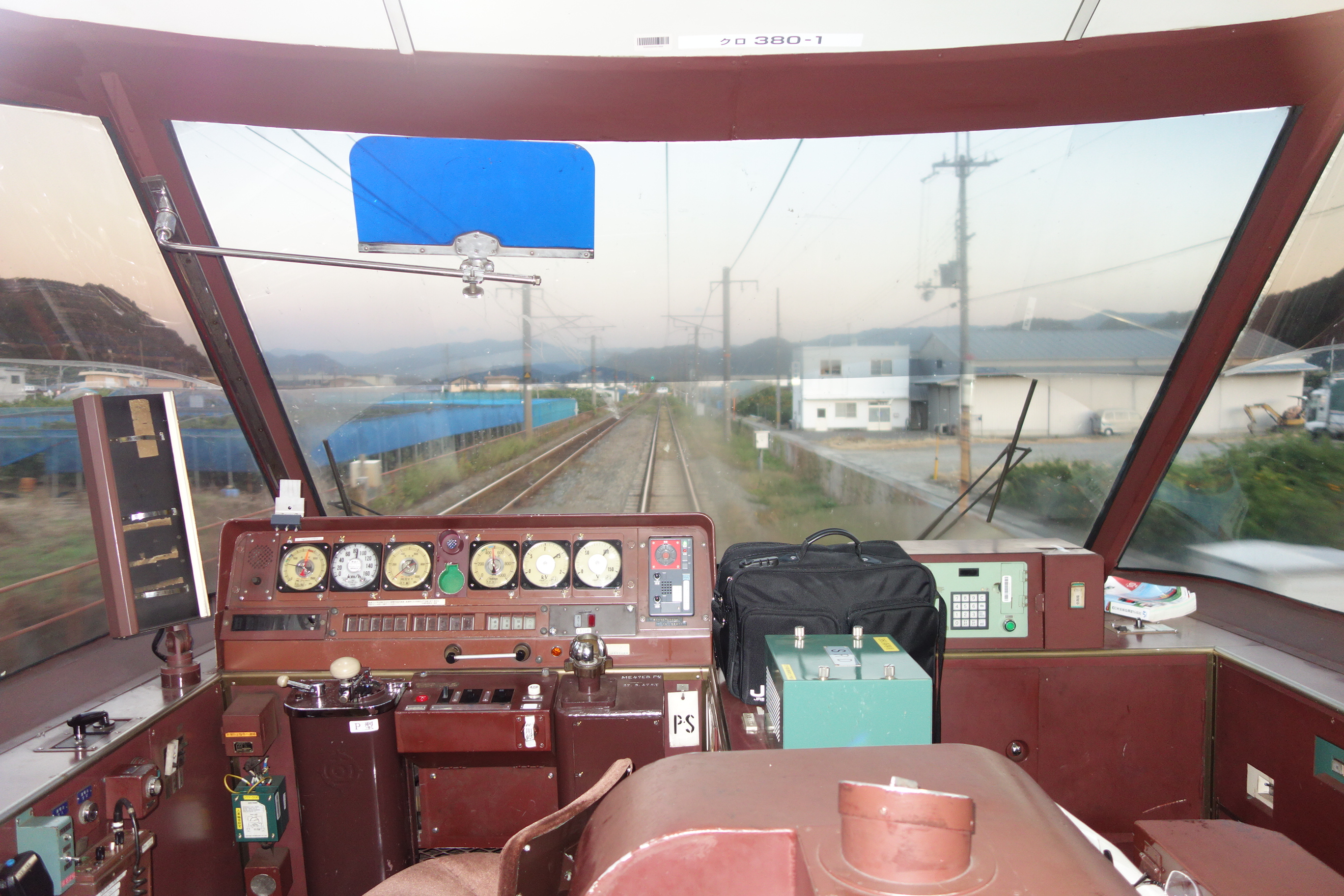 クロ380の運転台